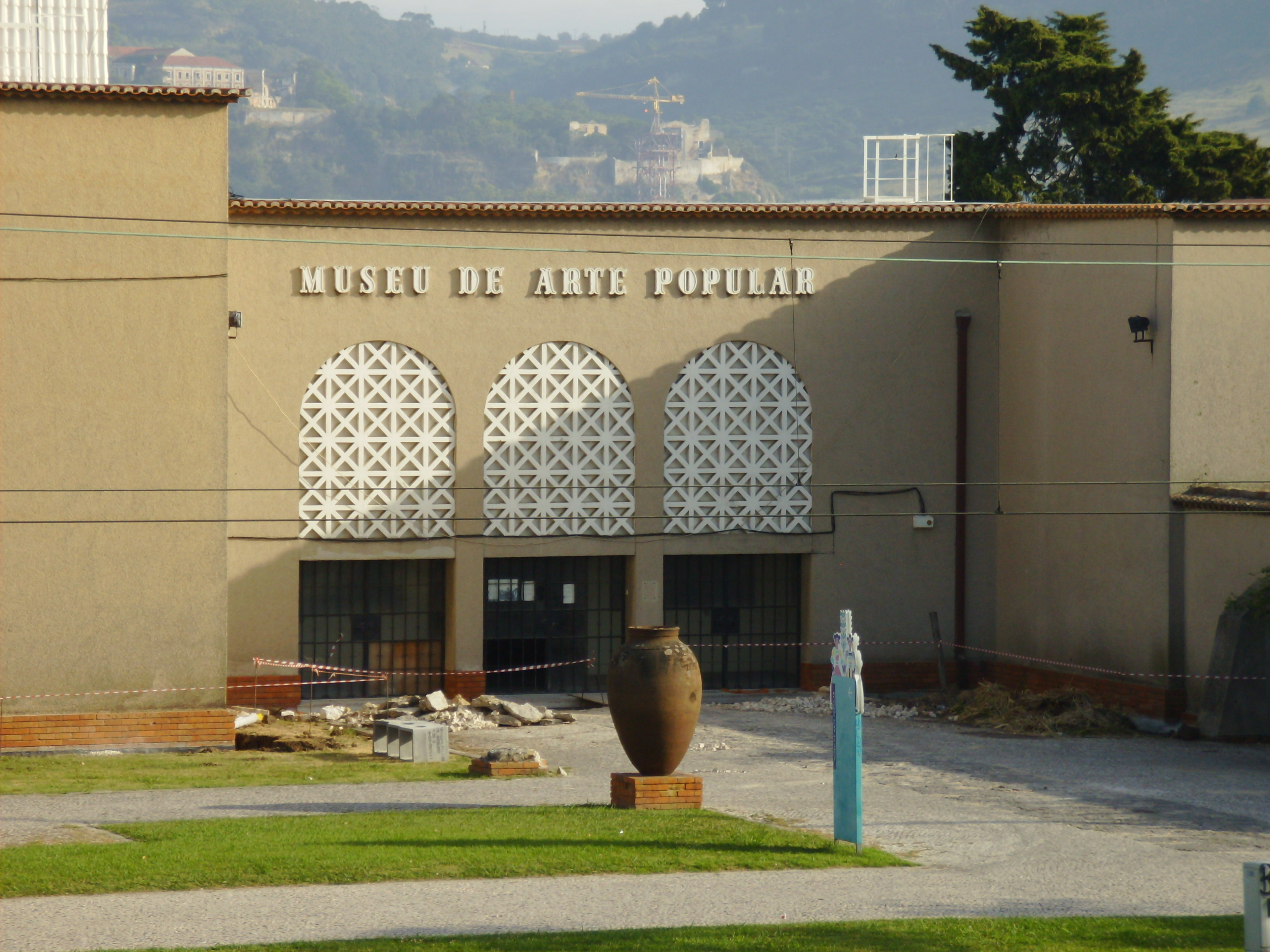 Museu de Arte Popular, Lisboa, Portugal.